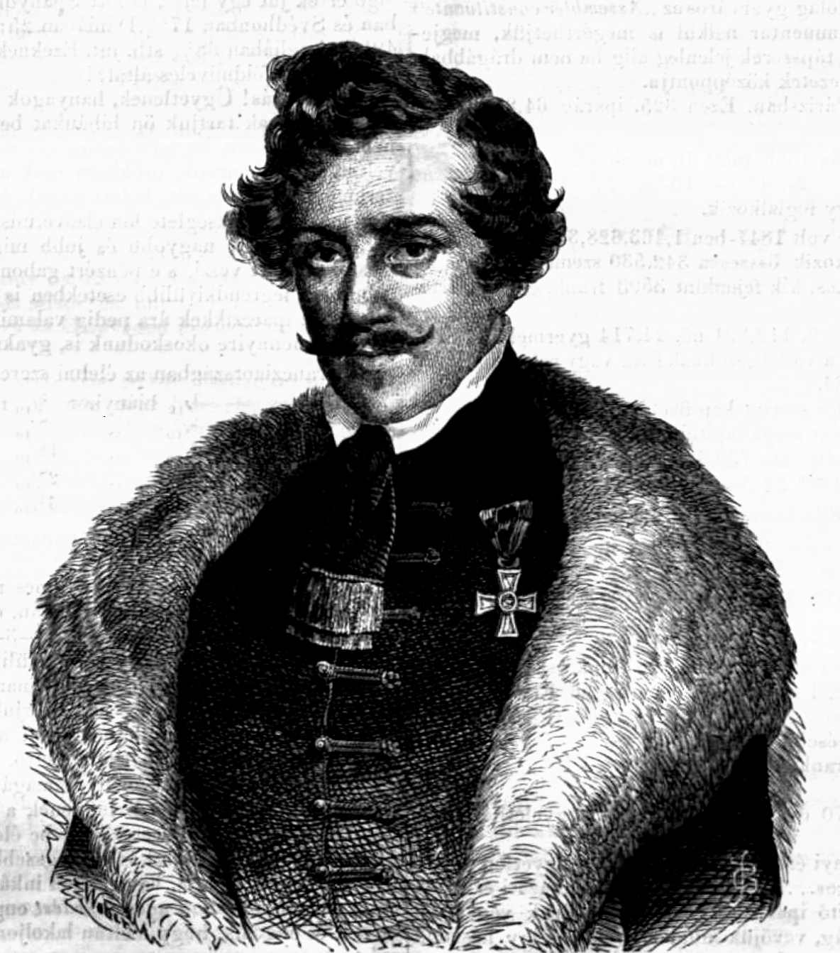 Jósika Sámuel (1805–1860) erdélyi kancellár (Vasárnapi Ujság, 1856. október 26.)